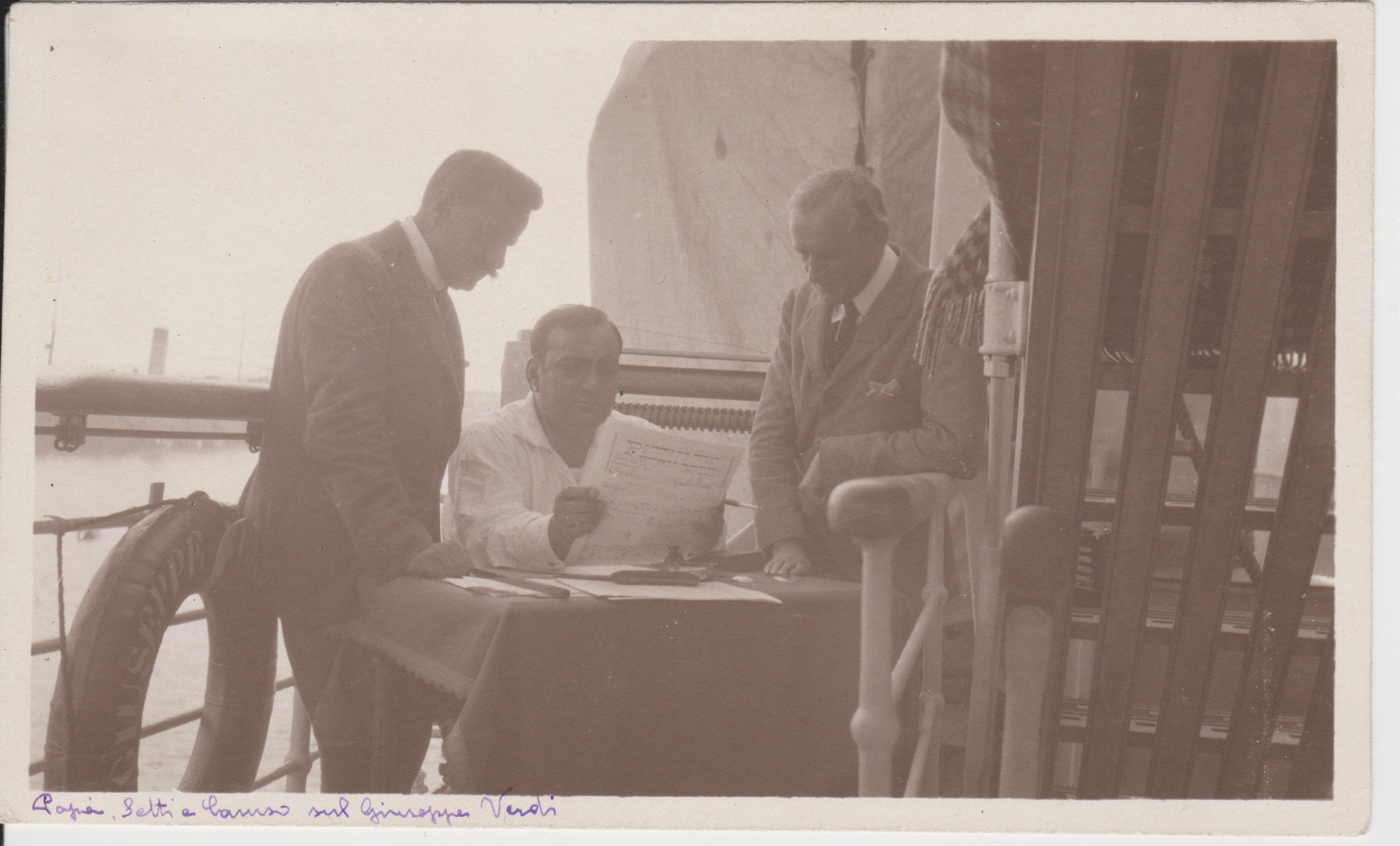 Scalero, Setti e Caruso, agosto 1919, a bordo del transatlantico Giuseppe Verdi durante il viaggio verso gli Stati Uniti